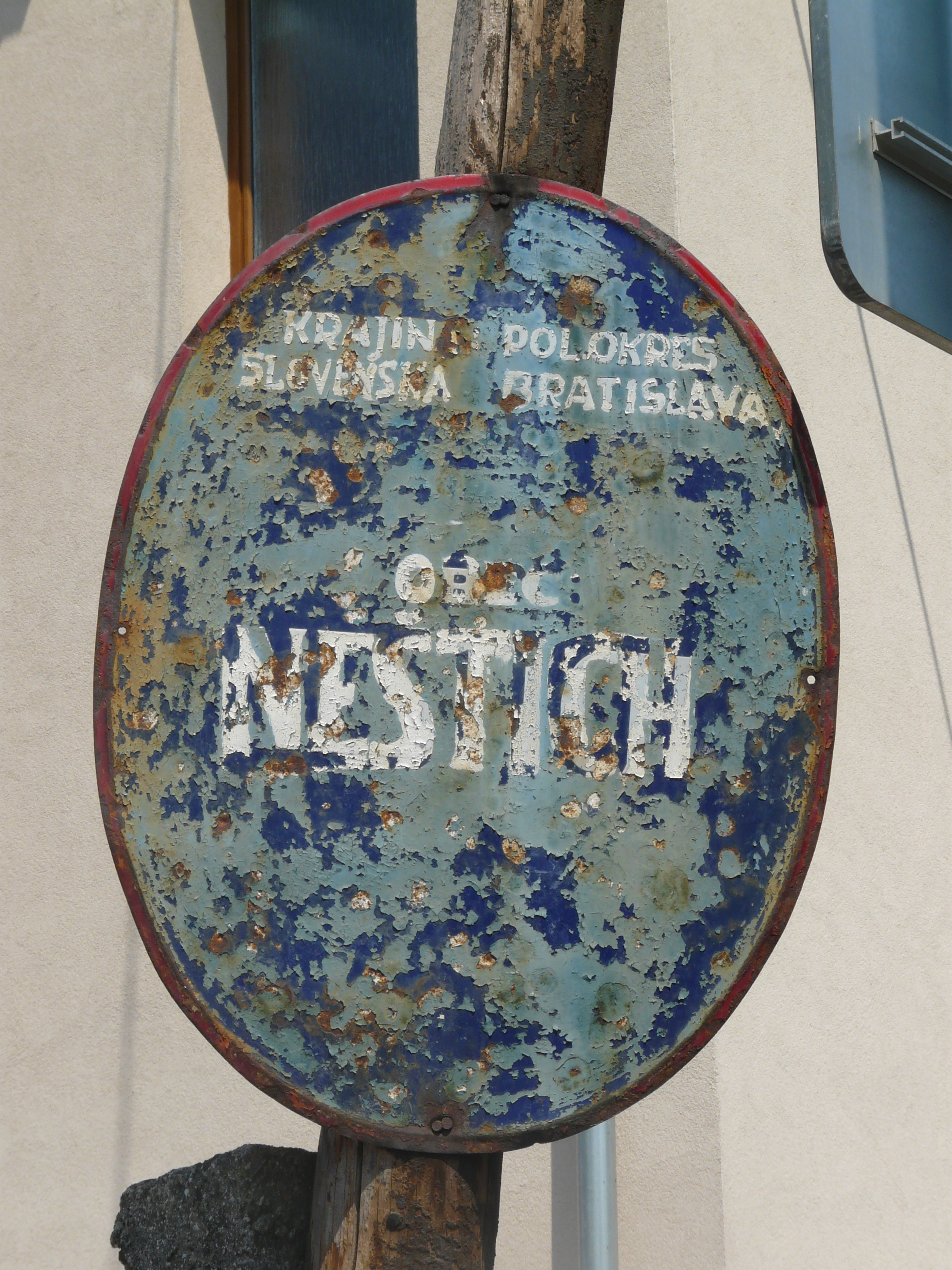 vita vas obec Nestich